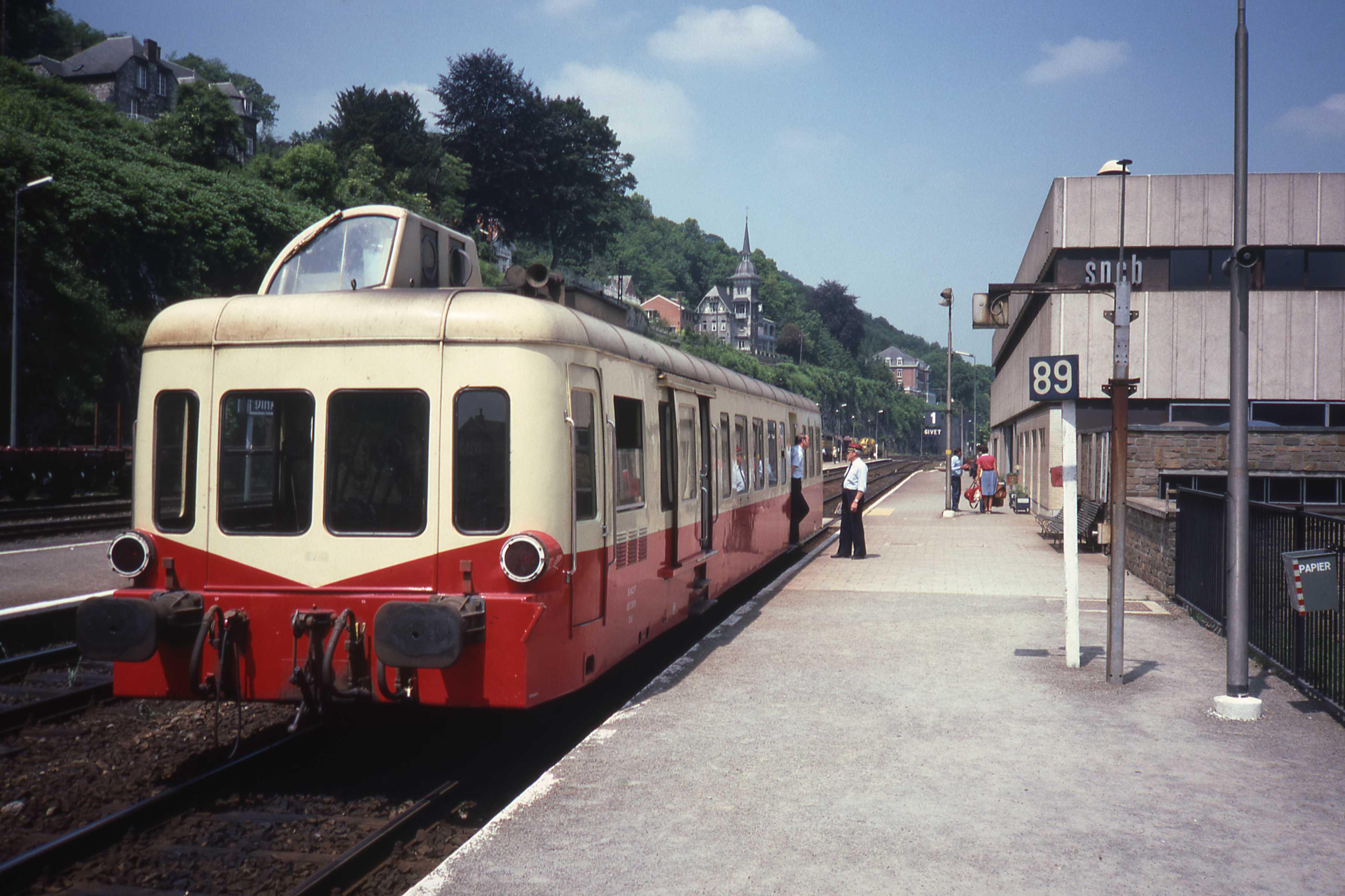 Franse Picasso trein in Dinant richting Givet